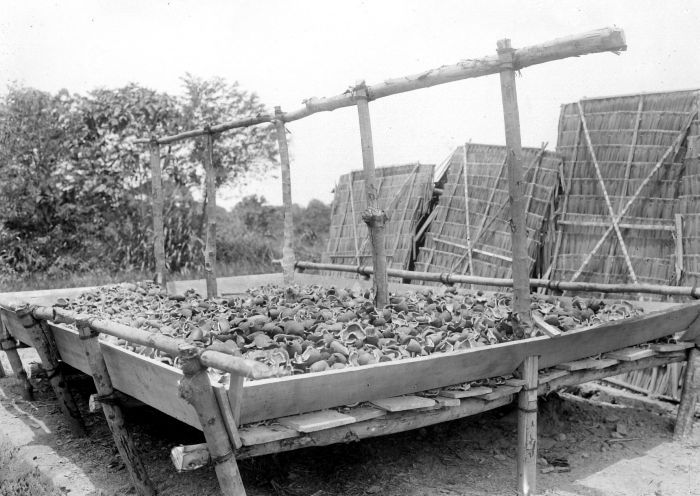 Negatief. Het drogen van kopra op de onderneming Tjintaraja, oostkust Sumatra